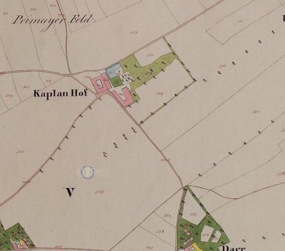 Lage des Kaplanhofes (Edelsitz Lustenfelden)nach dem Franziszeischem_Kataster